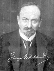 Georgy Vasilyevich Chicherin, Soviet Foreign Minister (1872-1936)